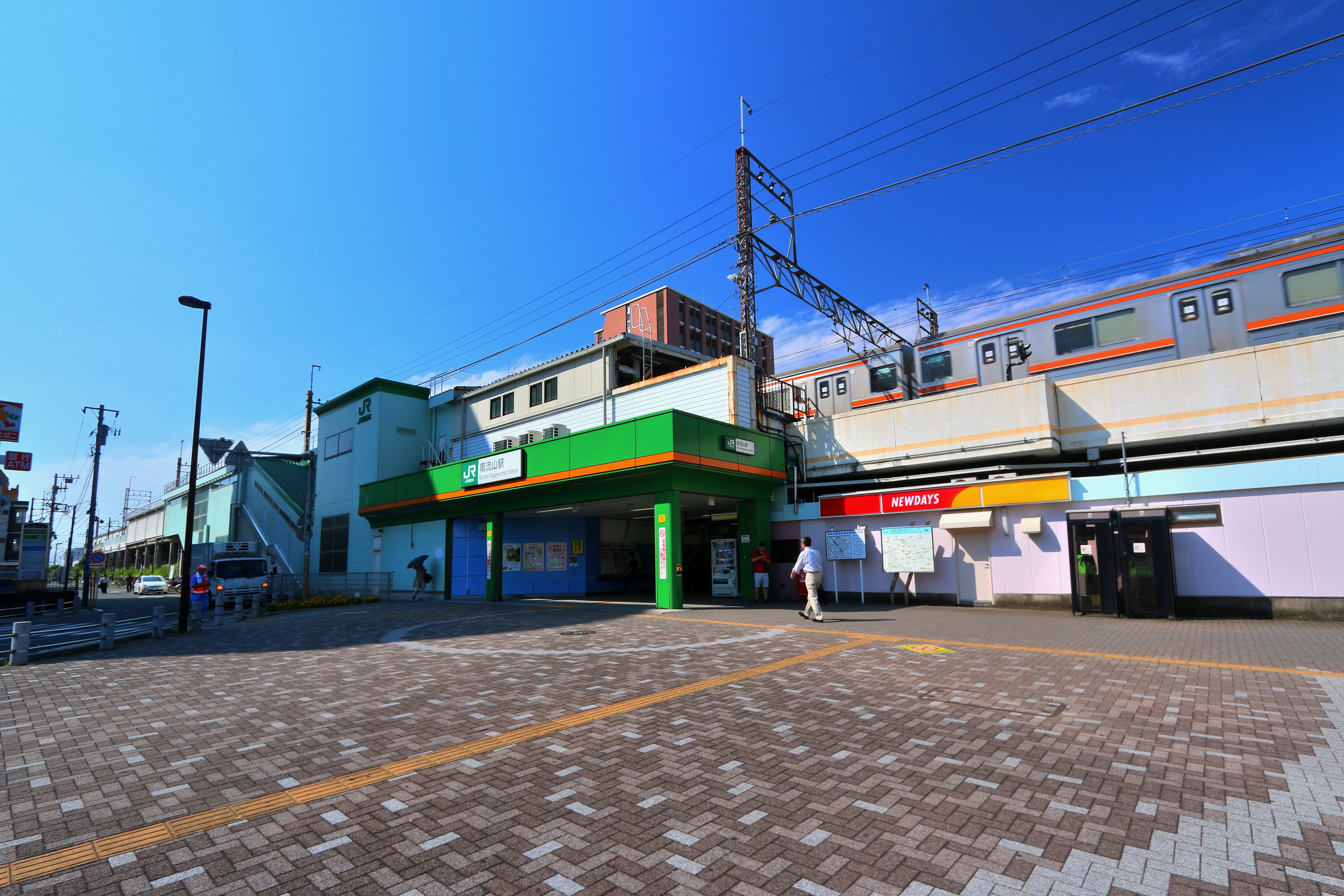 南流山駅